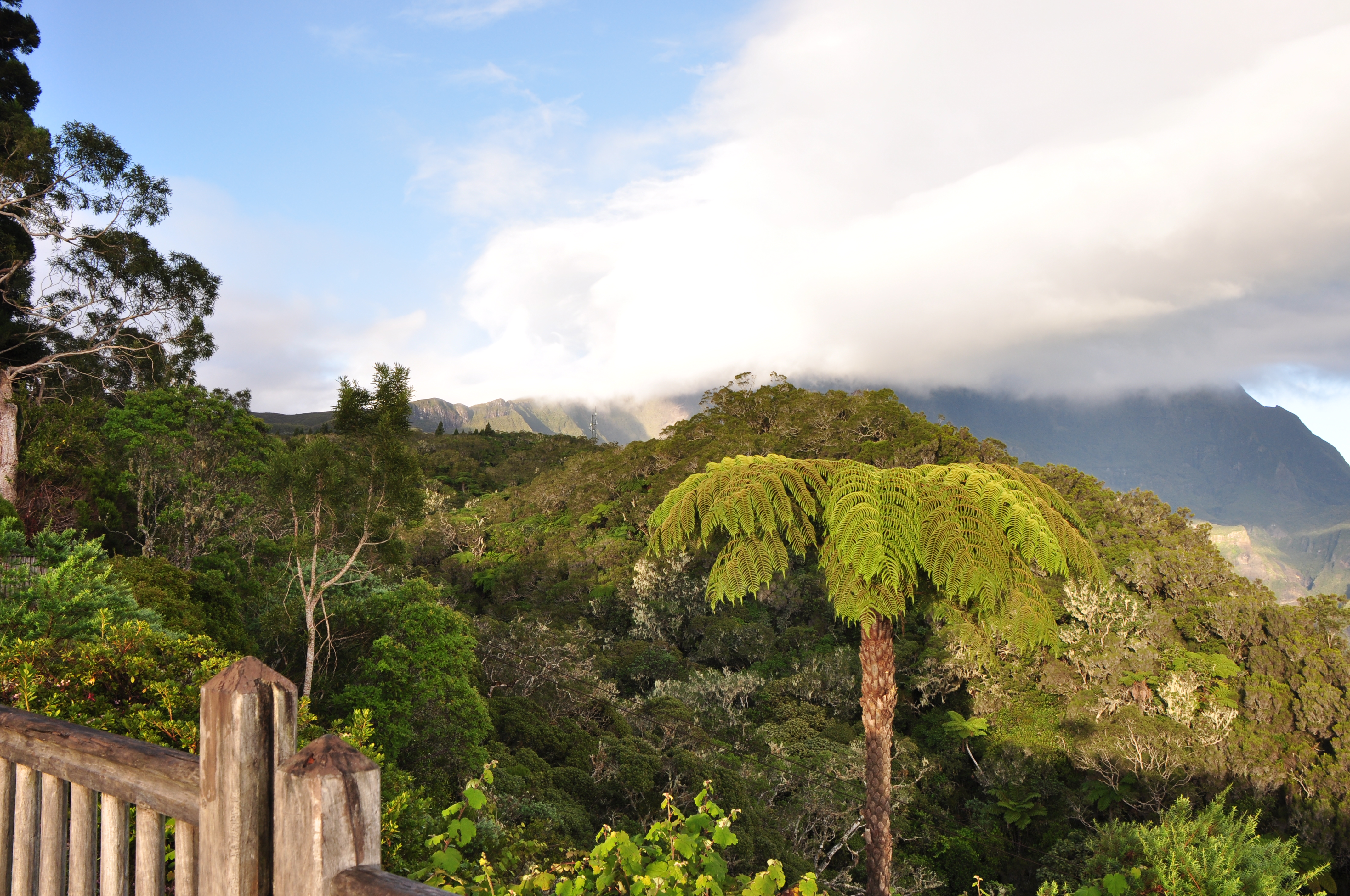 Forêt de Bélouve depuis le gîe